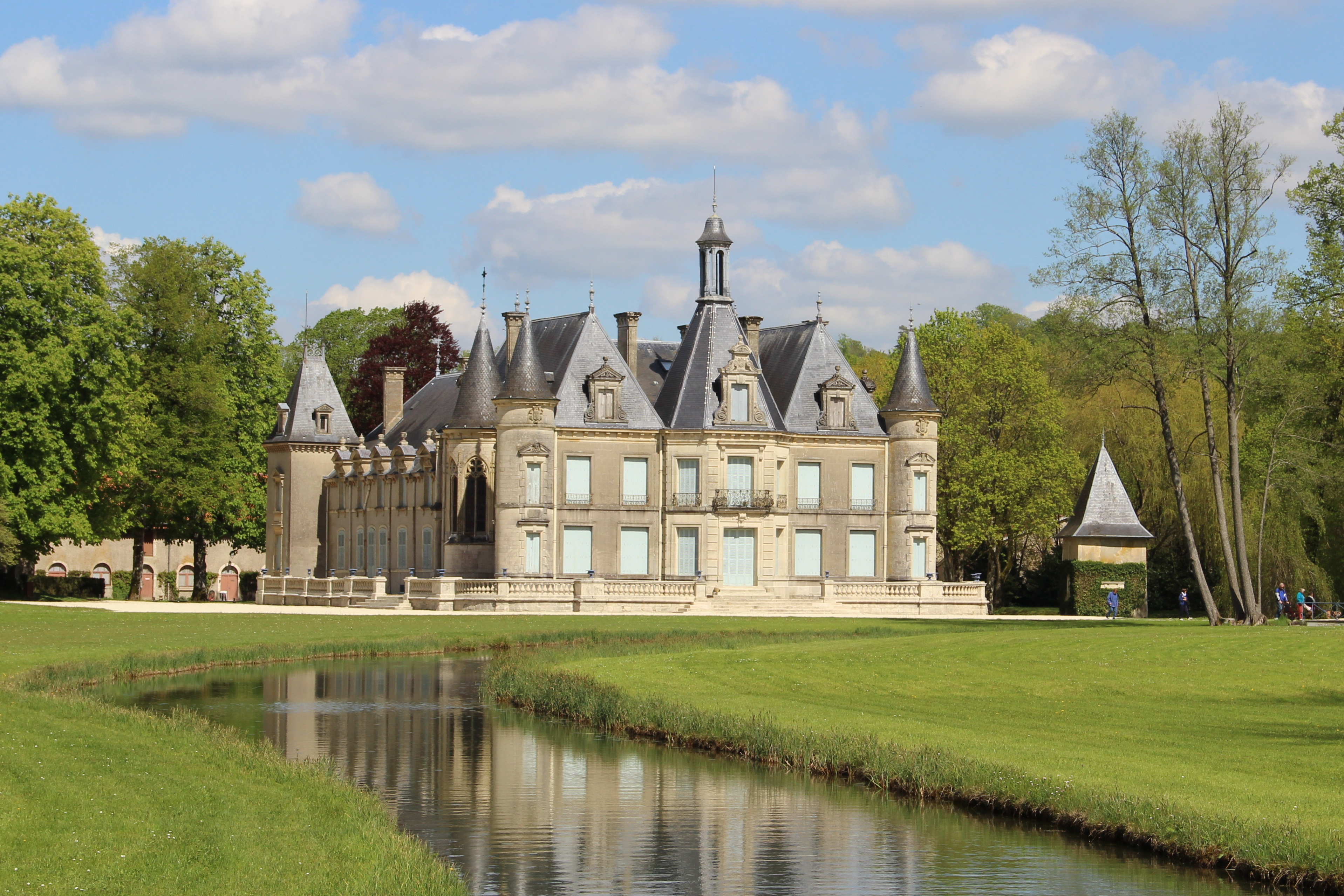 Chateau de Thillombois